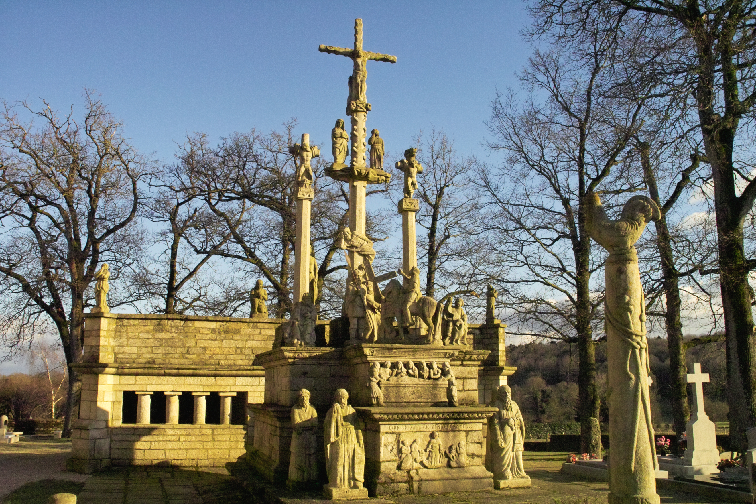 Calvaire du 16e siècle .